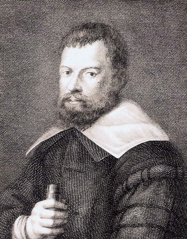 Galileo as a young